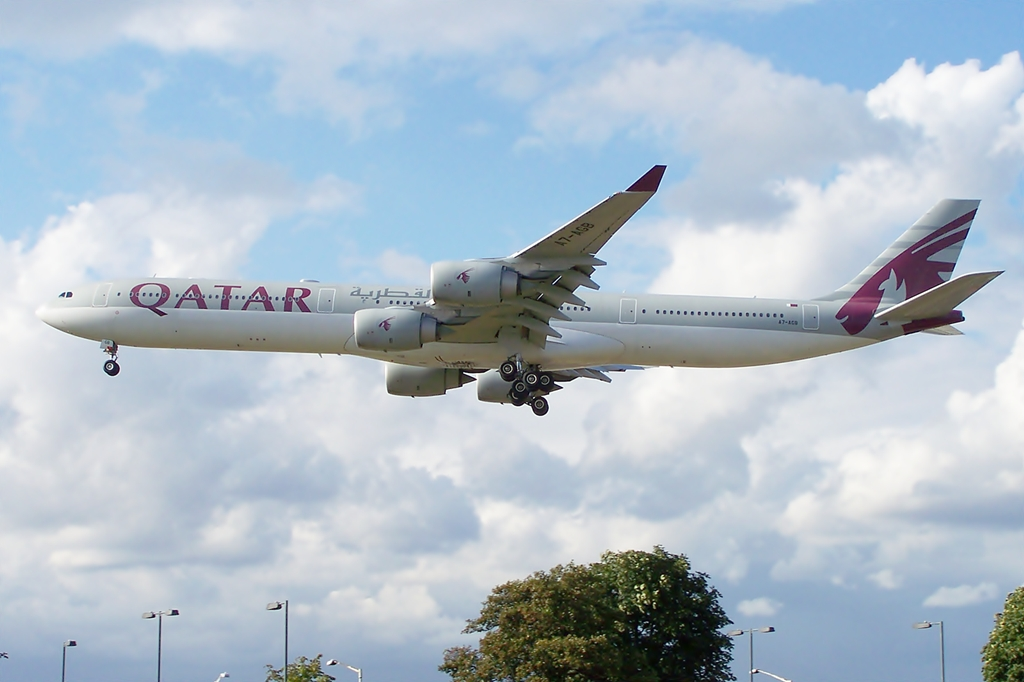 A7-AGB A340 Qatar